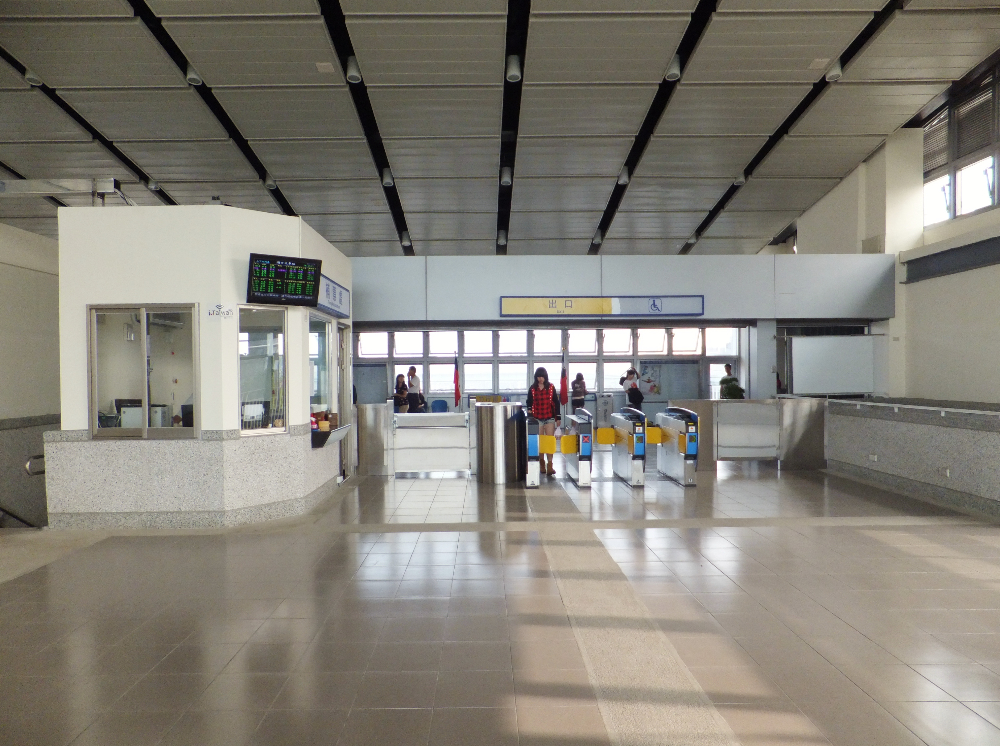 臺鐵湖口站三樓驗票閘門與穿堂。